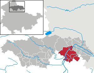 Verwaltungsgemeinschaft An der Schmücke in Thuringia - Kyffhäuserkreis